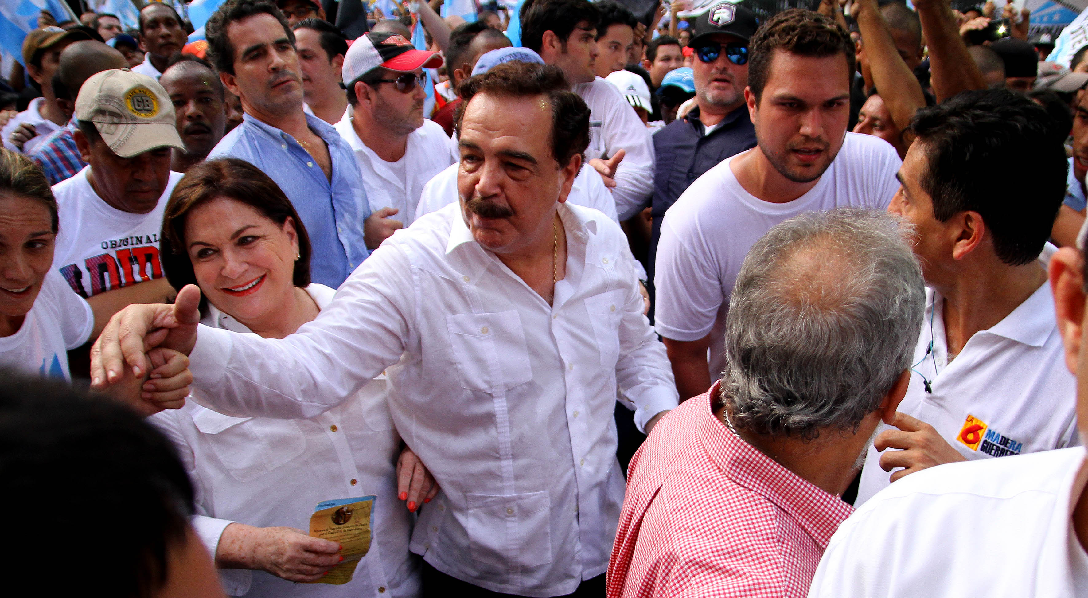 Guayaquil, 25 de jun del 2015 (Andes).-Jaime Nebot, alcalde de Guayaquil llega hasta la marcha que convoco en la avenida Nueve de octubre Foto:César Muñoz/Andes Protesta convocada por el alcalde de Guayquil, Jaime Nebot Saadi, en contra de las políticas del gobierno del economista Rafael Correa Delgado, presidente de la República del Ecuador. Guayaquil, avenida 9 de Octubre, jueves 25 de junio de 2015.